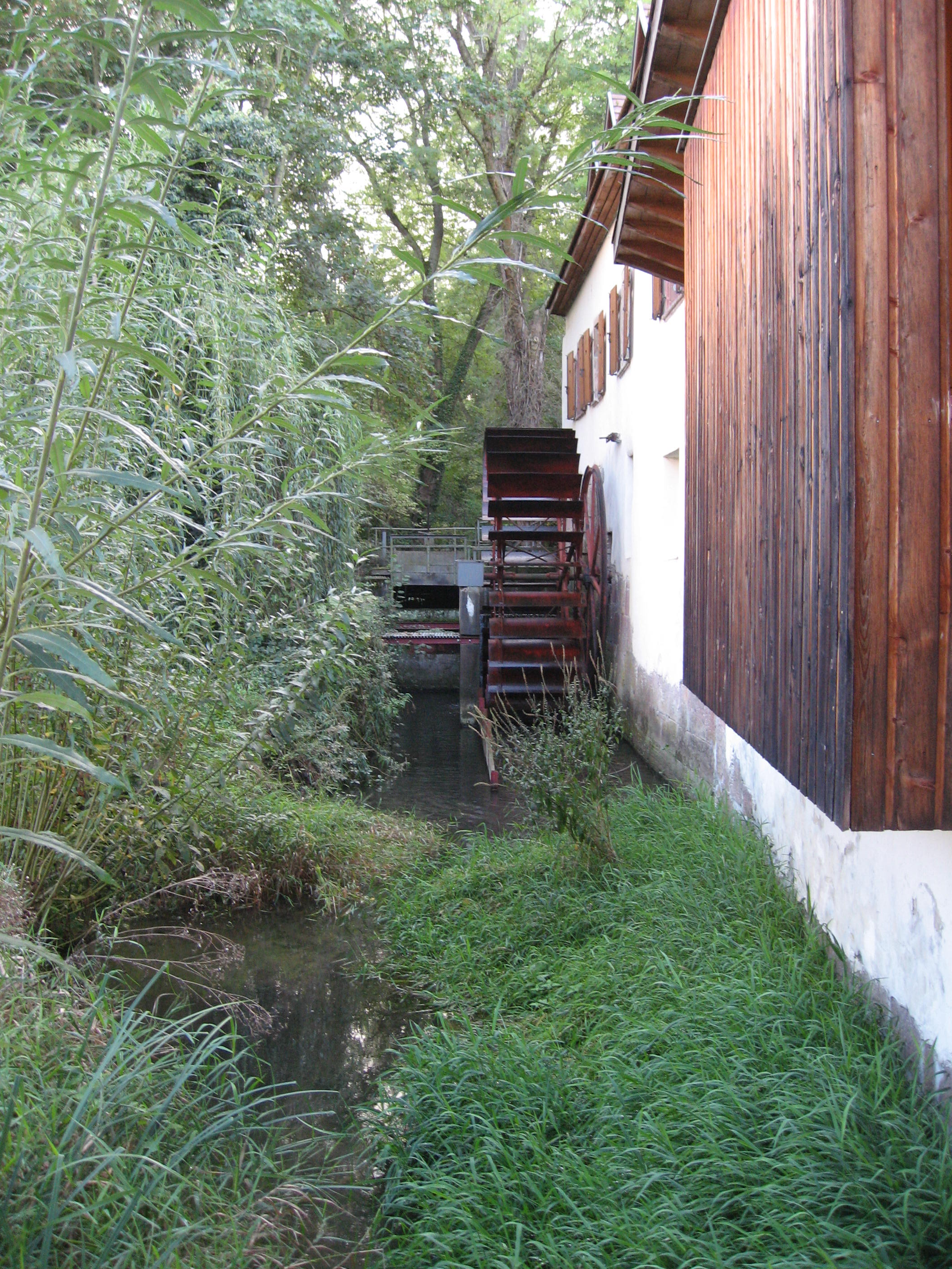 roue du moulin alimenté par le Dollerbaechlein